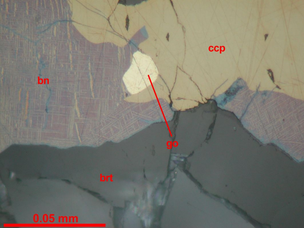 gediegen Gold zwischen Bornit (bn) und Chalcopyrit (ccp) in Baryt (brt), sedimentär-exhalative Mineralisation in Süd Australien